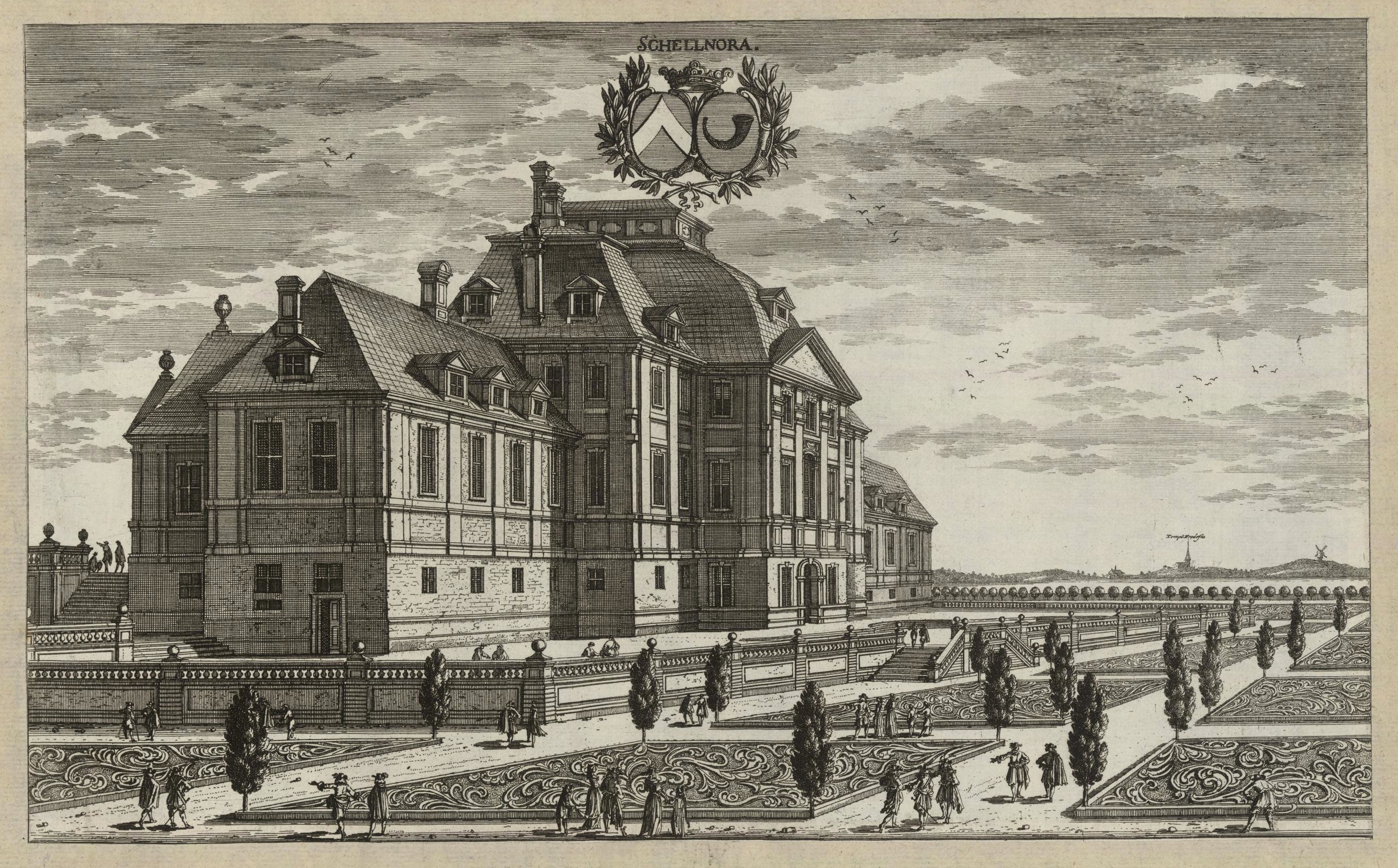 Schellnora (Skällnora)/Sköldnora manor